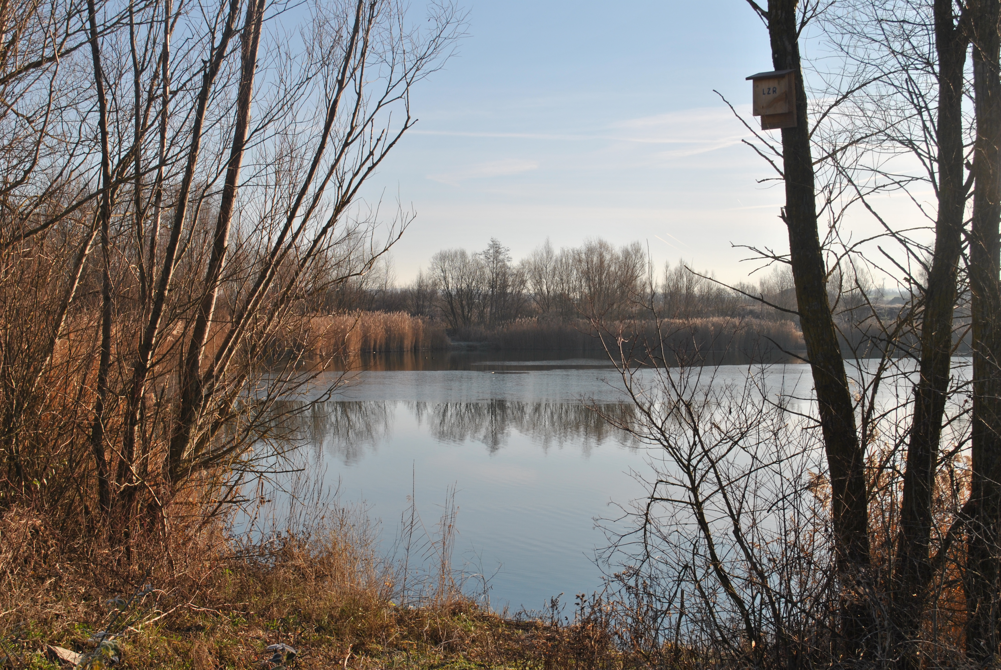 Baggersee bei Schwarzach am Main-Hörblach, Teil des Hörblacher Seengebietes